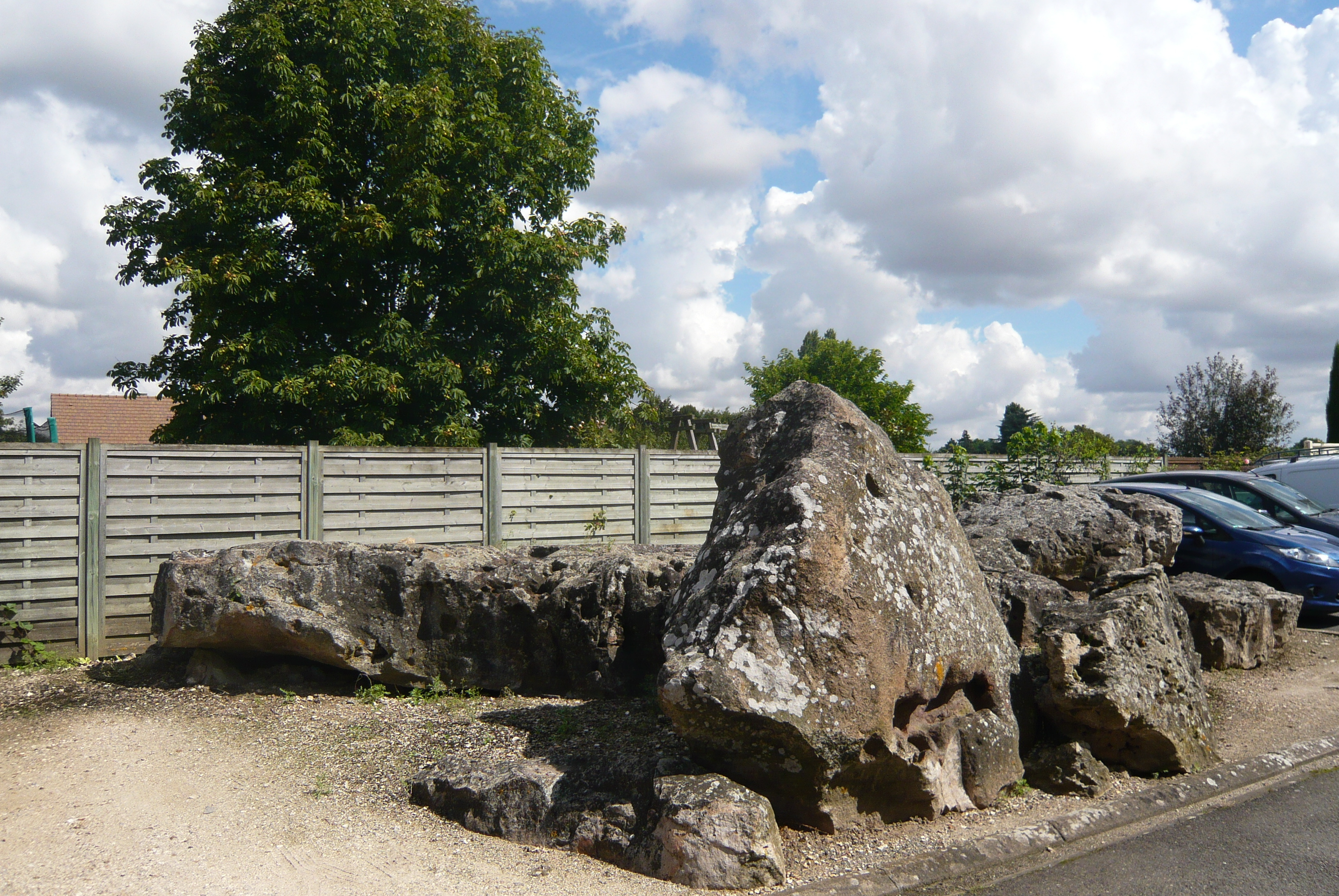 Dolmen La Pierre qui Tourne, Morancez, Eure-et-Loir (France).